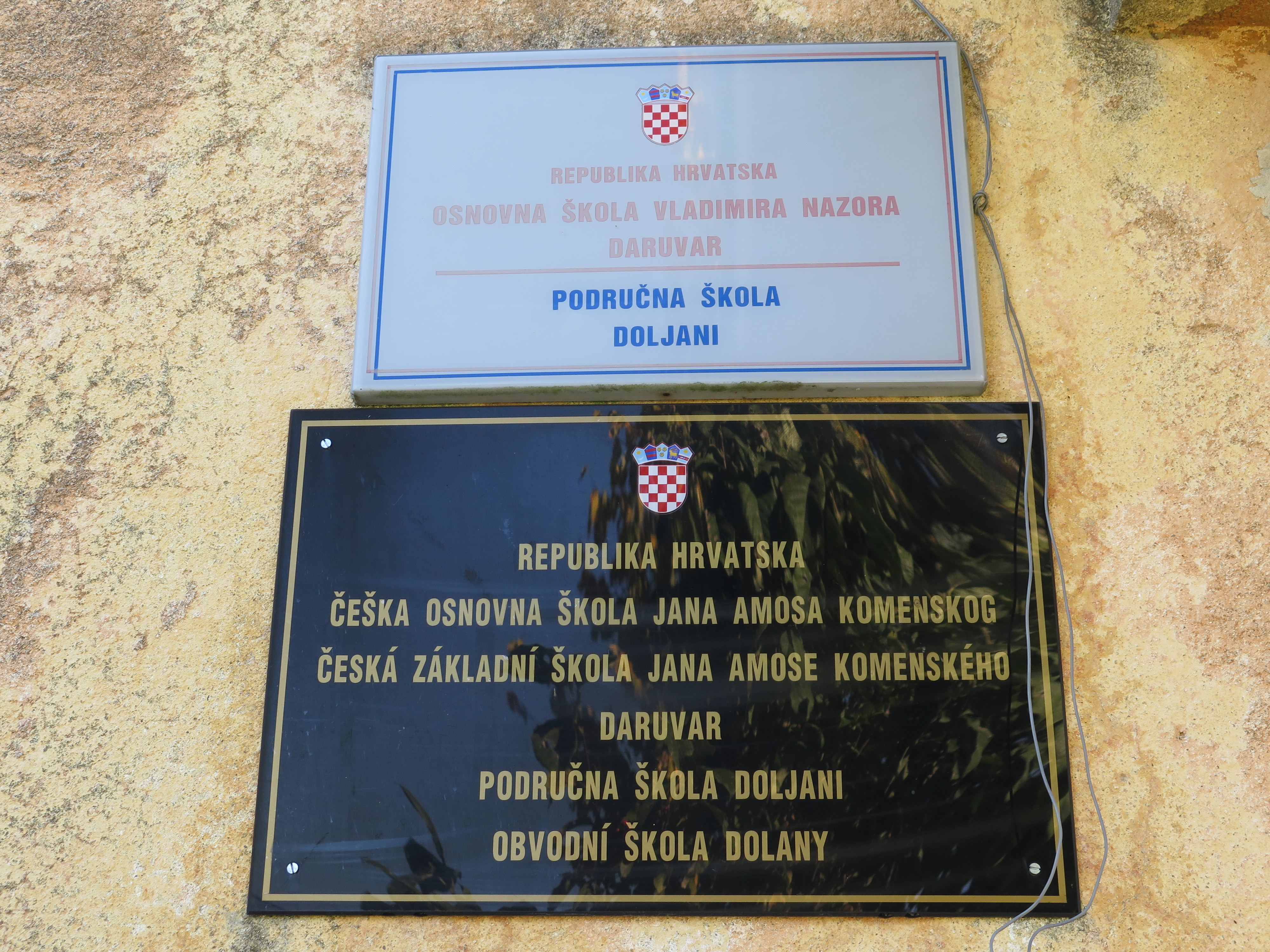 Dolní Střežany – škola